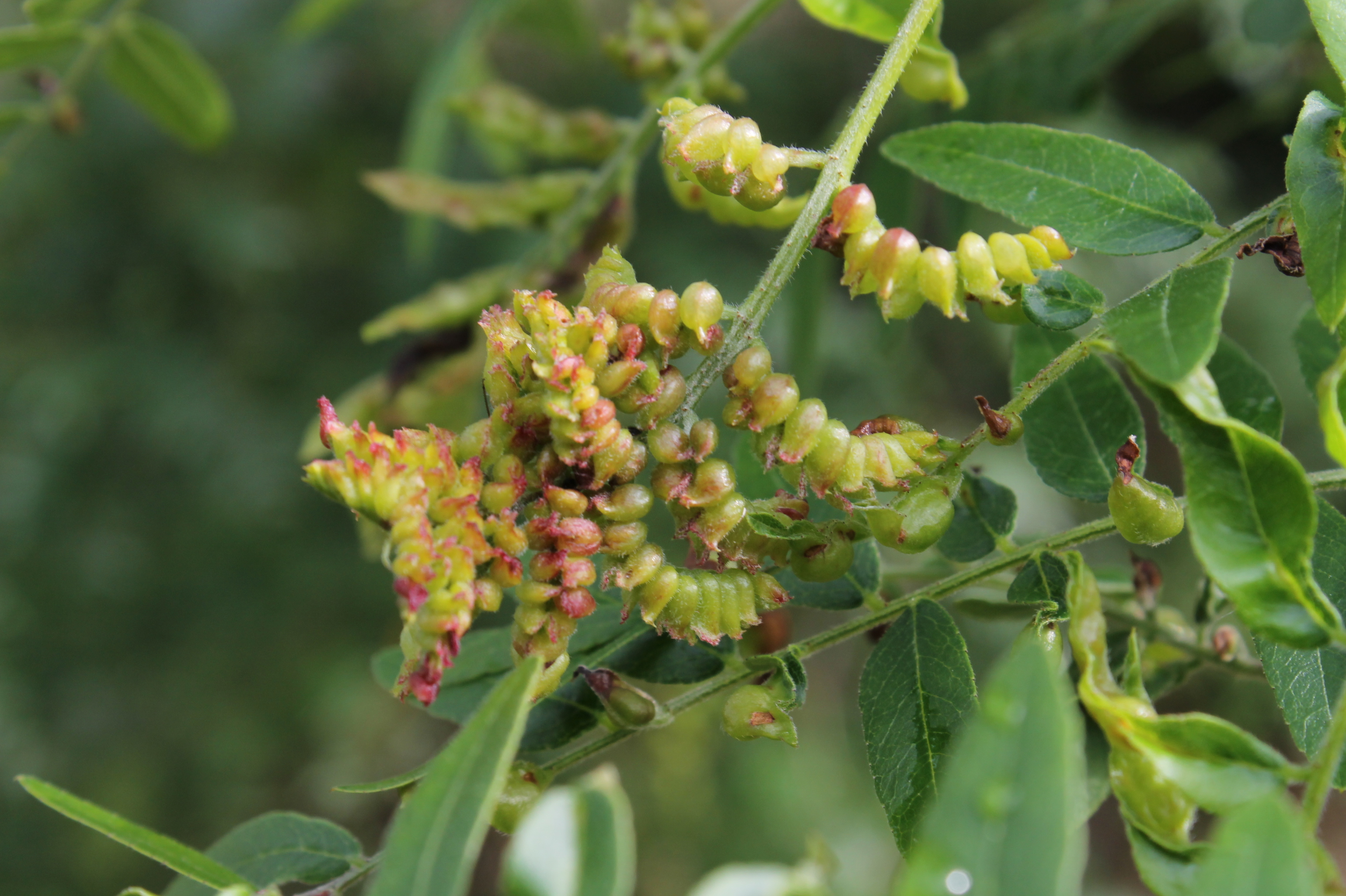 Bejlomorka dřezovcová (Dasineura gleditchiae),hálky, Gleditsia triacanthos 'Sunburst' , Gymnázium Brno-Řečkovice